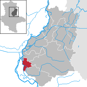 Biederitz im Landkreis Jerichower Land, Sachsen-Anhalt